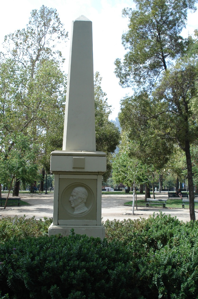 Obelisco dedicado a Fray Camilo Henríquez, Manuel de Salas, Manuel José Gandarillas y Manuel de Salas, ubicado en el Parque Forestal de la ciudad de Santiago de Chile.